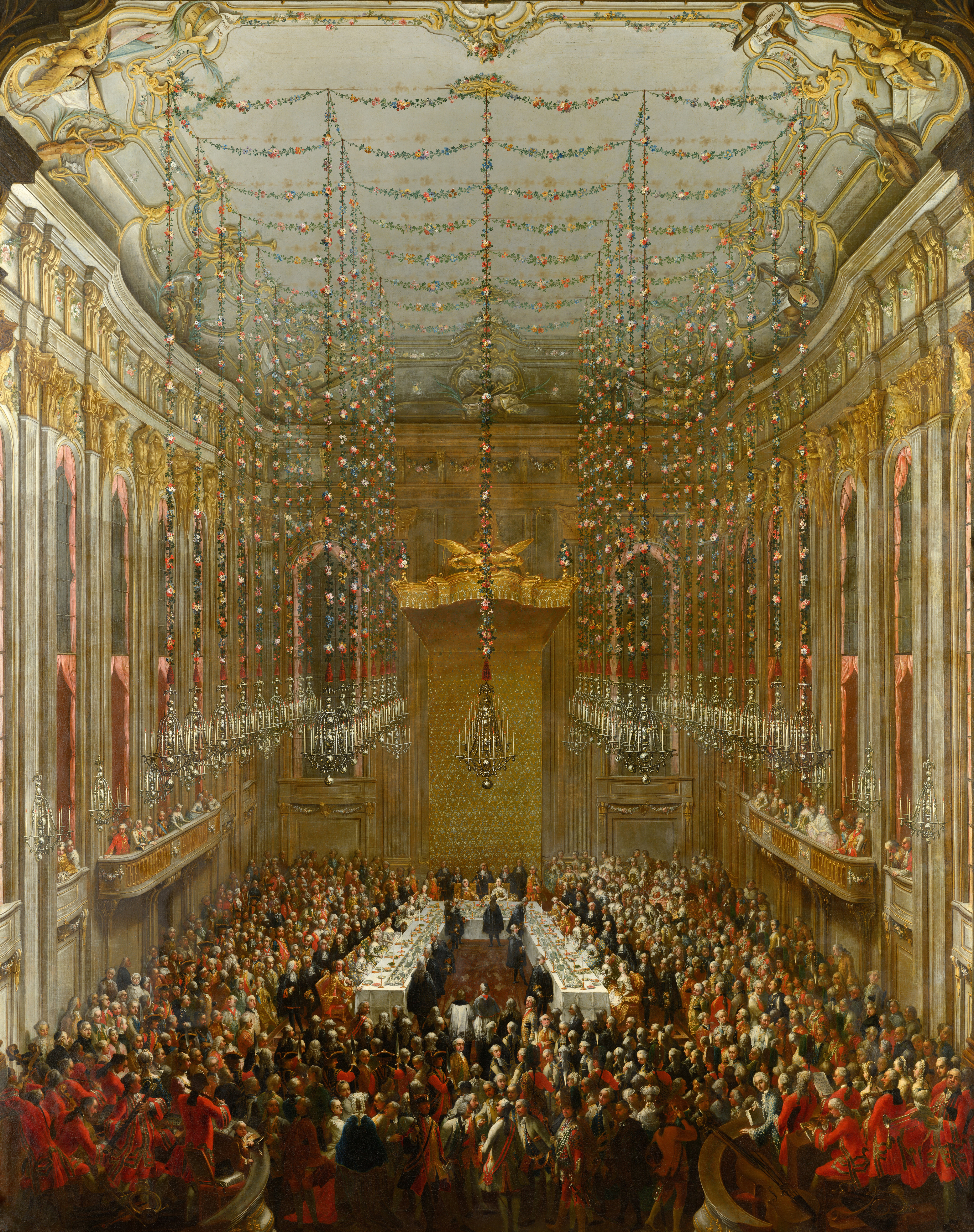 Wedding Supper